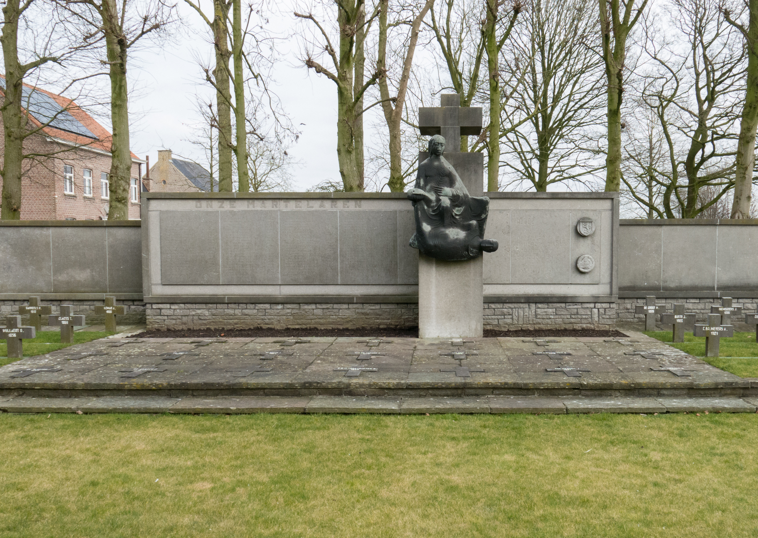 Vinkt massacre